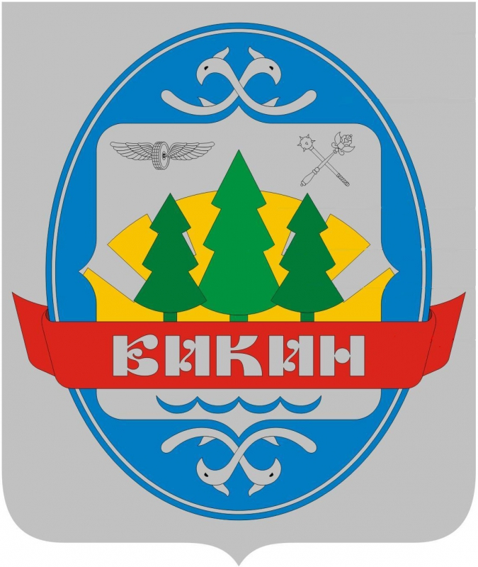 Герб Бикина.